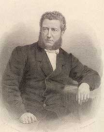 Jan Jacob Lodewijk ten Kate (1819-1889)